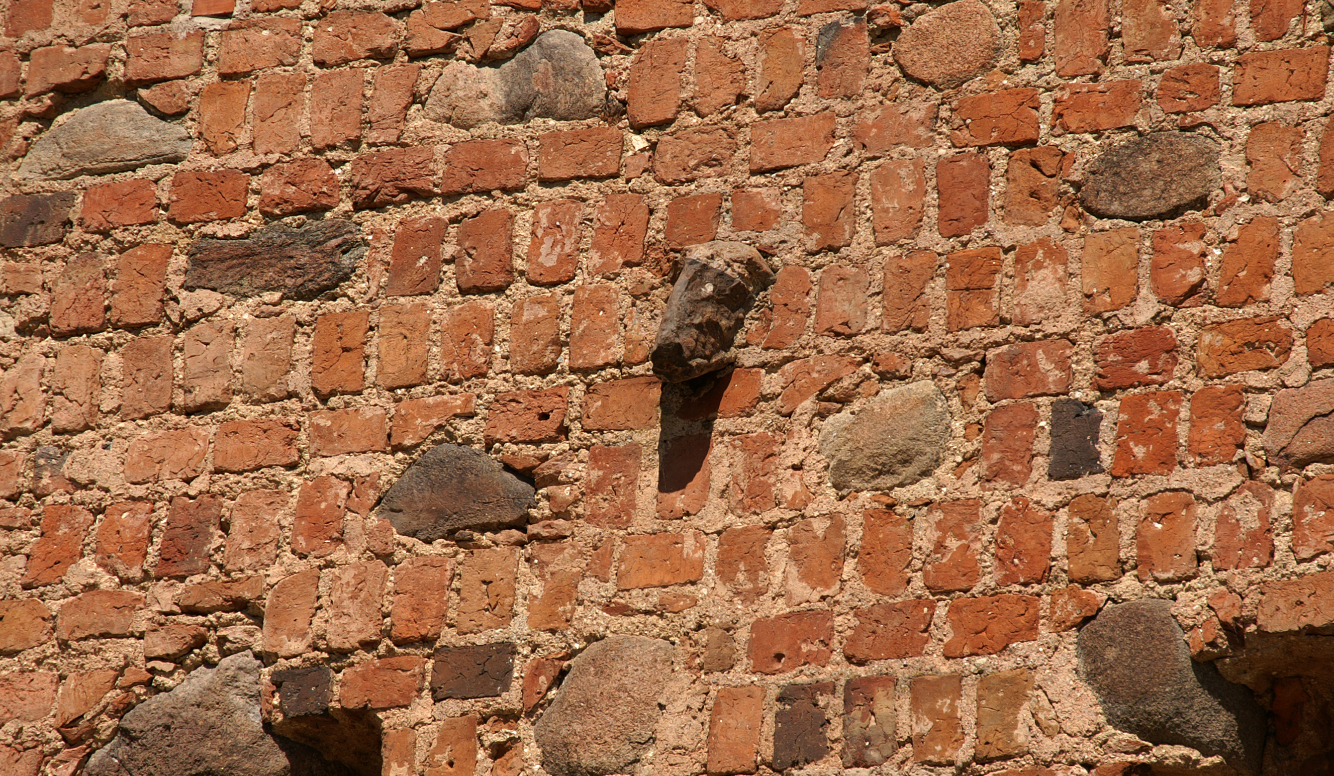 Беларуская (тарашкевіца): Замкавы комплекс «Мір». Будынкі, збудаваньні, пляніровачная структура, ляндшафтныя кампазыцыі, рэшткі земляных абарончых збудаваньняў, элемэнты абвадненьня. г.п. Мір This is a photo of Belarusian heritage monument. Reference number: 410Г000317 ( WLM)